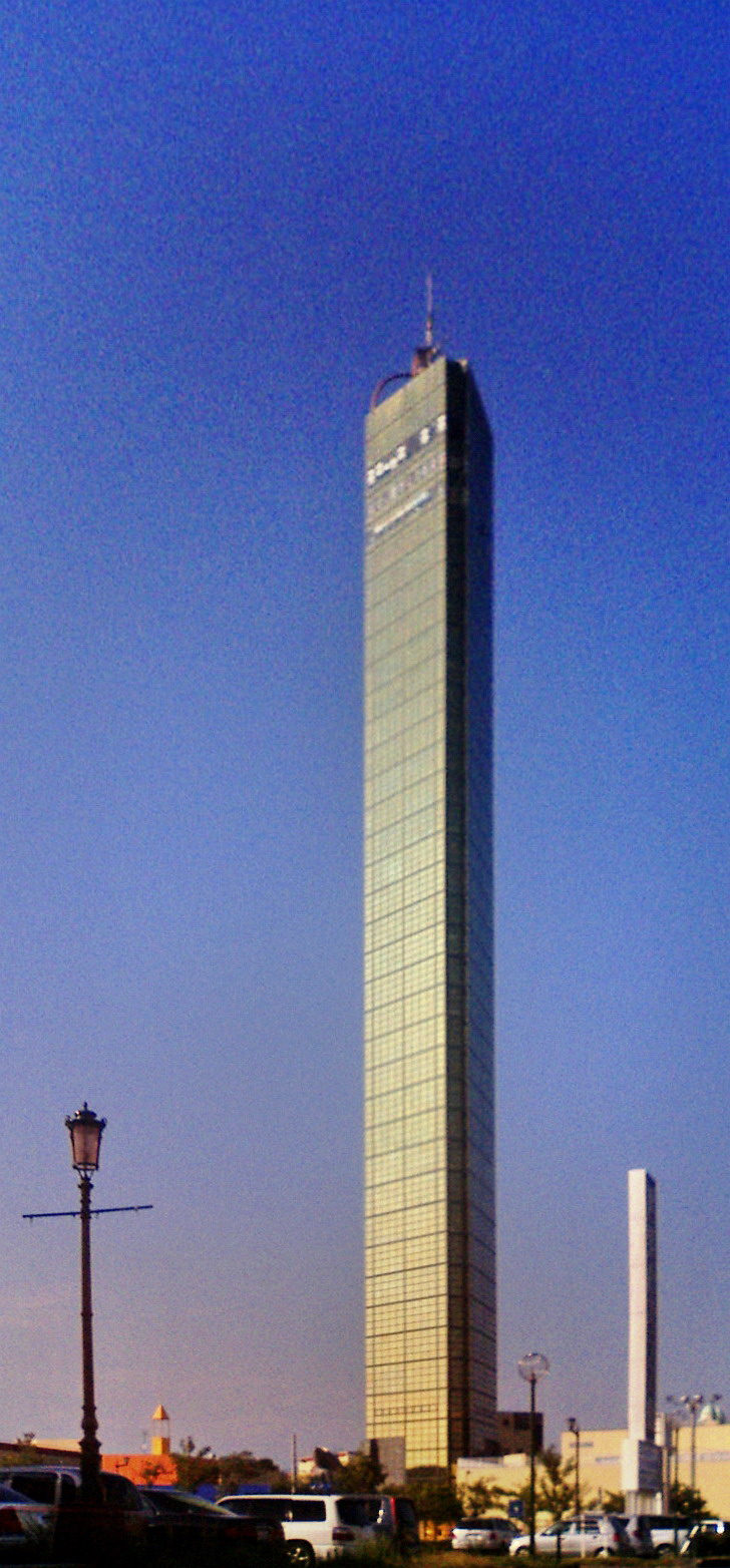 ゴールドタワー - 日本国香川県宇多津町。